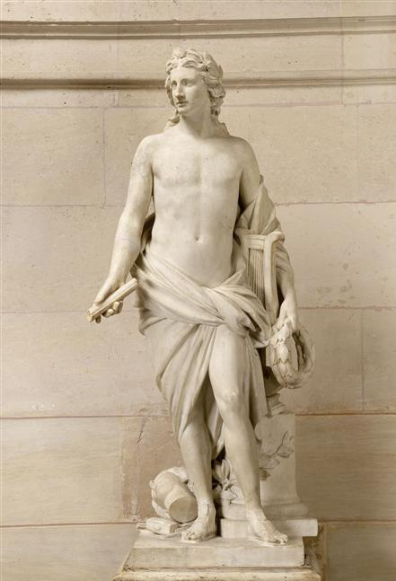 Apollon, par Guillaume II Coustou, 1753. Musée de Versailles, MV7951.